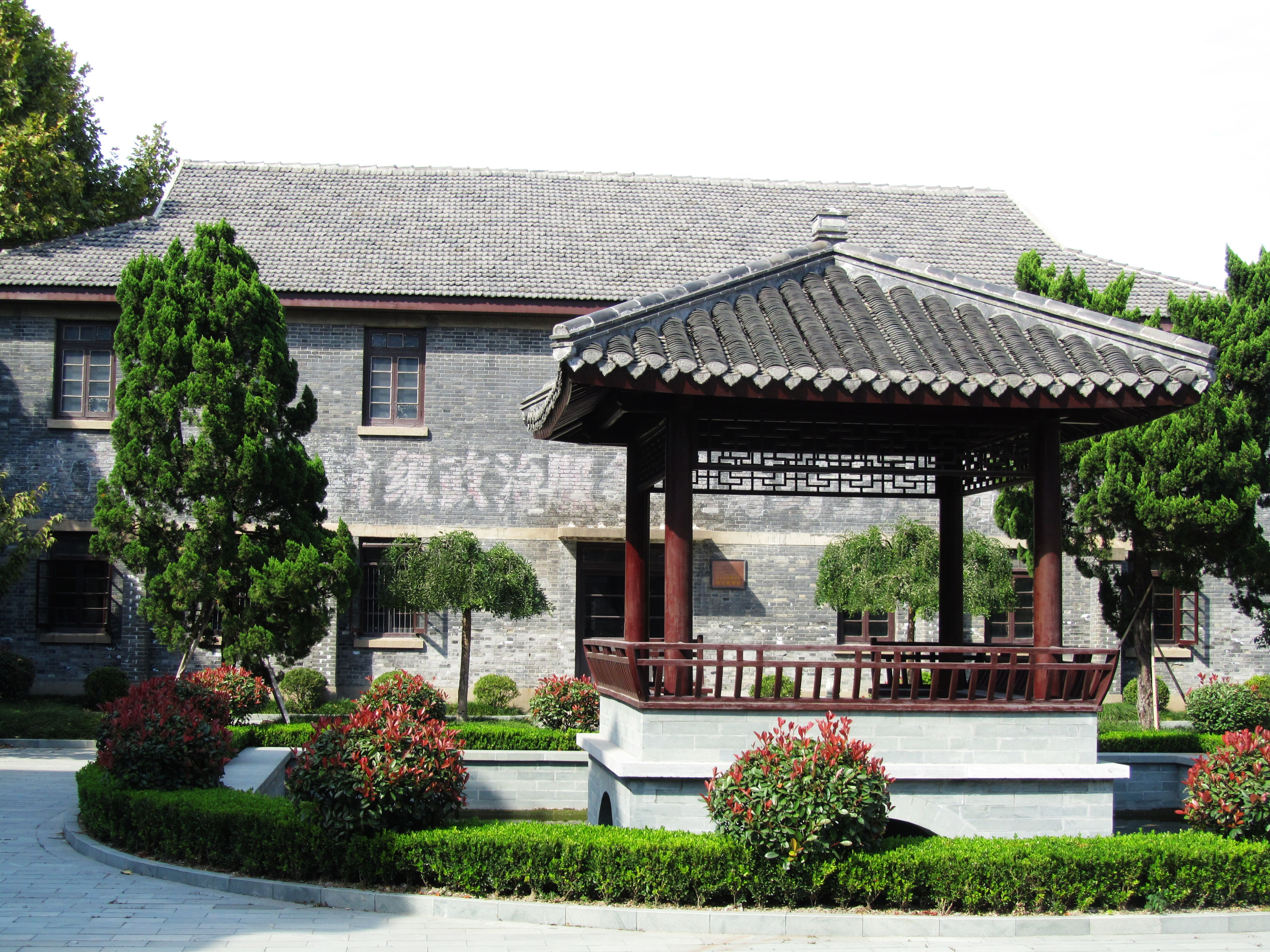 江苏省泰州中学老校区，1号楼（校史馆）及水池、方亭。